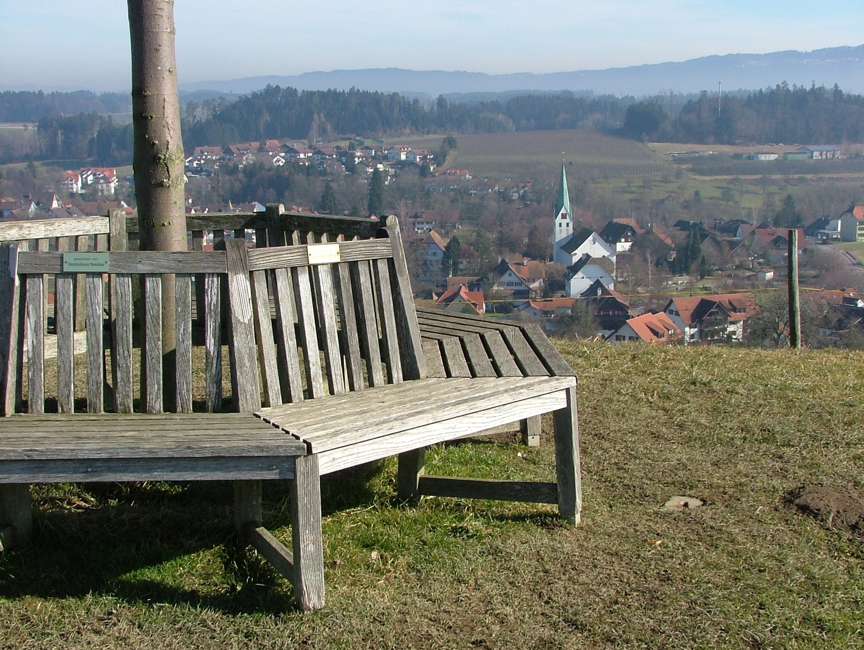 Oberreitnau